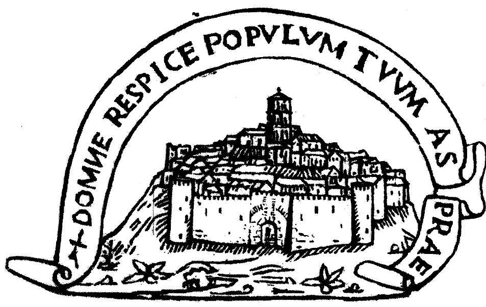 Stemma della comunità di Aspra inciso sullo statuto comunale